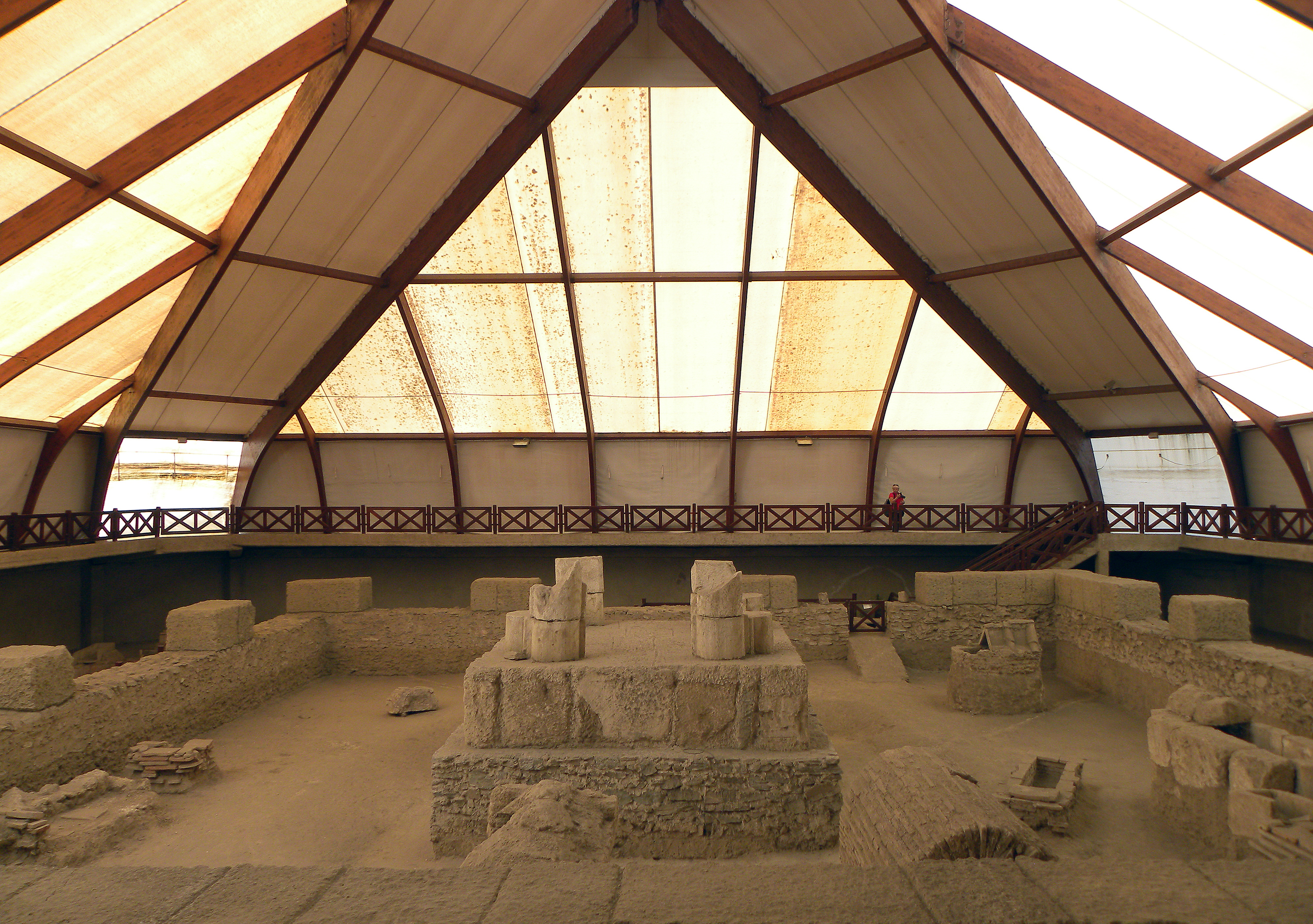 Viminacijum